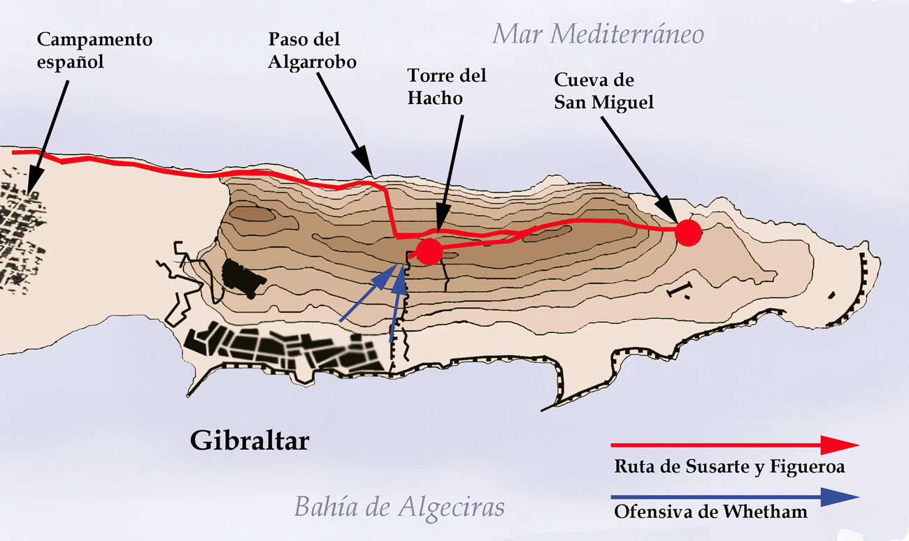 Ruta mostrada por el pastor Simón Susarte a las tropas españolas en el primer asedio a Gibraltar (1704)